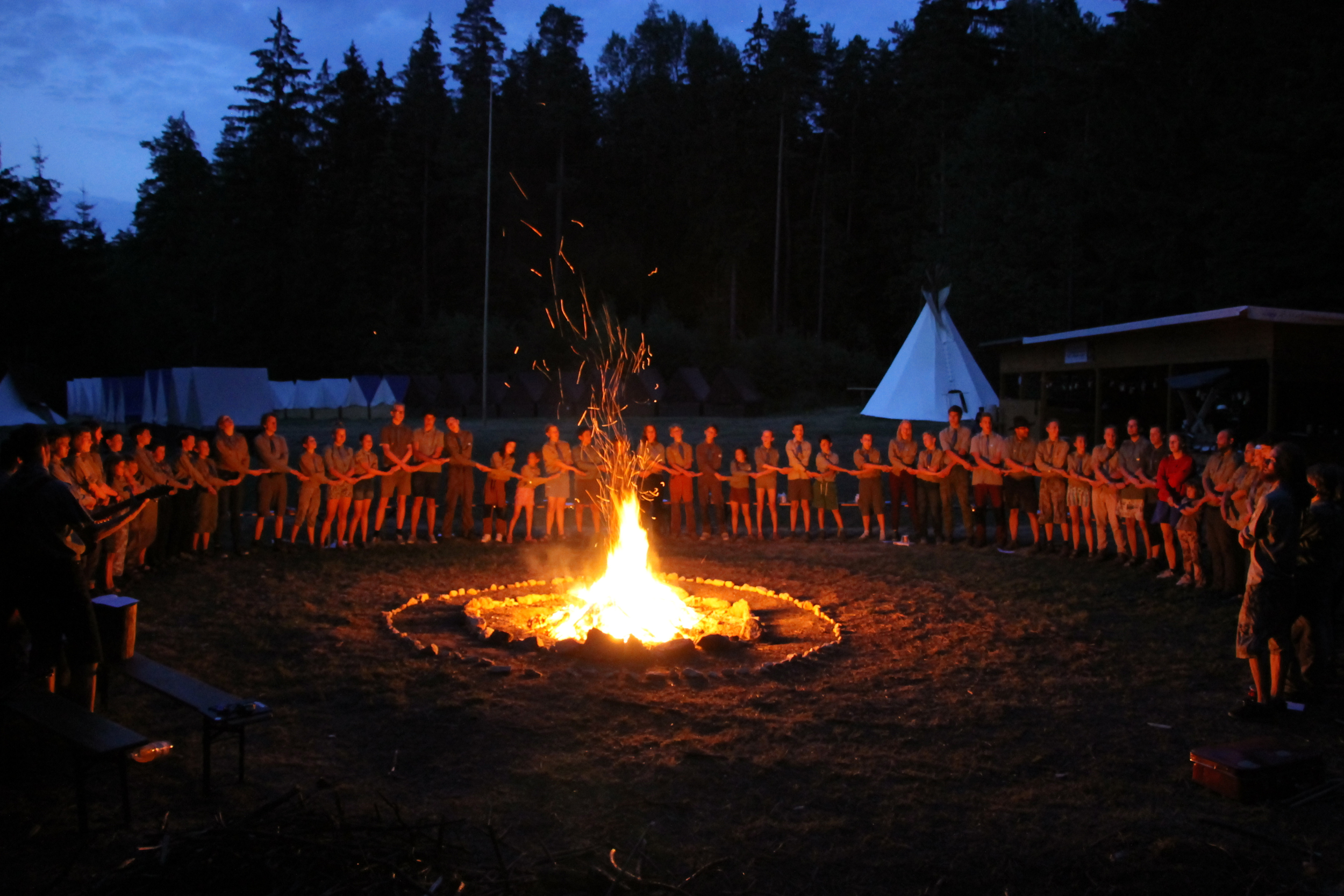 Slavnostní ukončení táborového ohně při zpěvu písně Ten vítr to ví (Blowing in the Wind). Spojené ruce značí, že tvoříme jeden kolektiv, na jednom místě je kruh přerušený - značí, že jsme otevřeni novým členům.